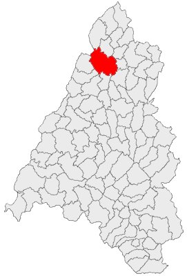 Categorie:Hărţi ale judeţului Bihor